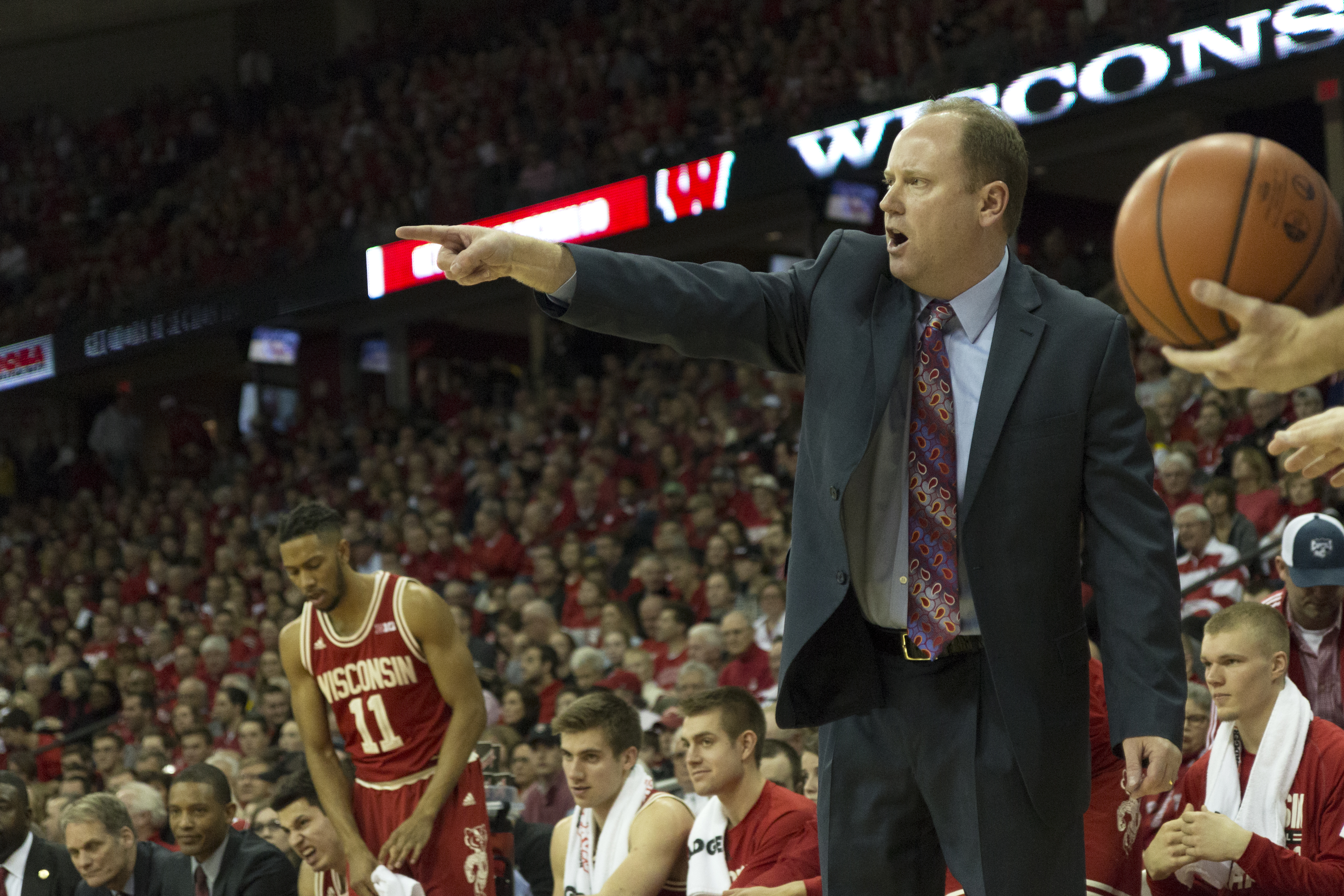 Greg Gard in 2016